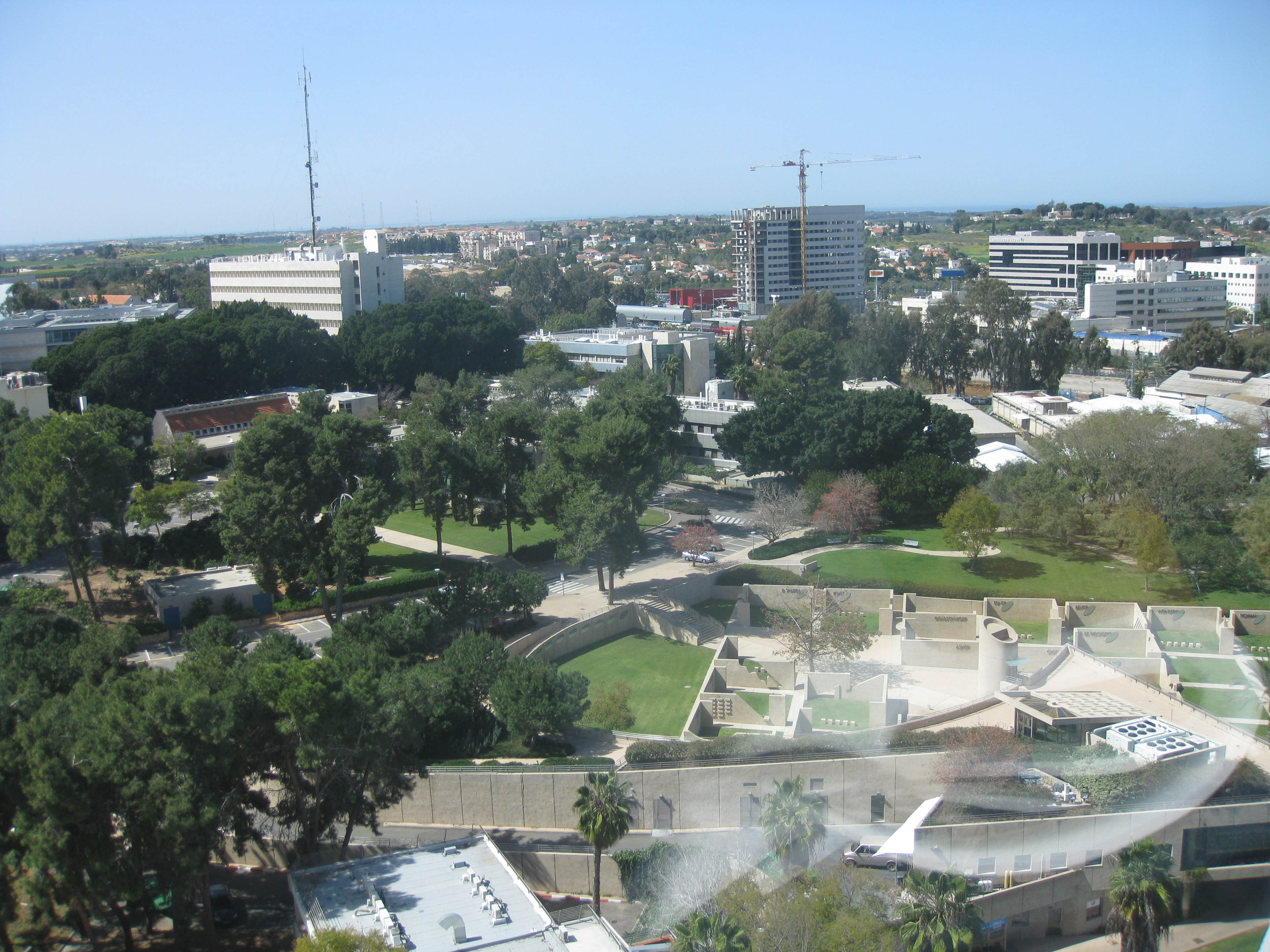 The Weizmann Institute - - מכון ויצמן View from the Particles Accelerator מבט ממרפסת התצפית של מאיץ החלקיקים